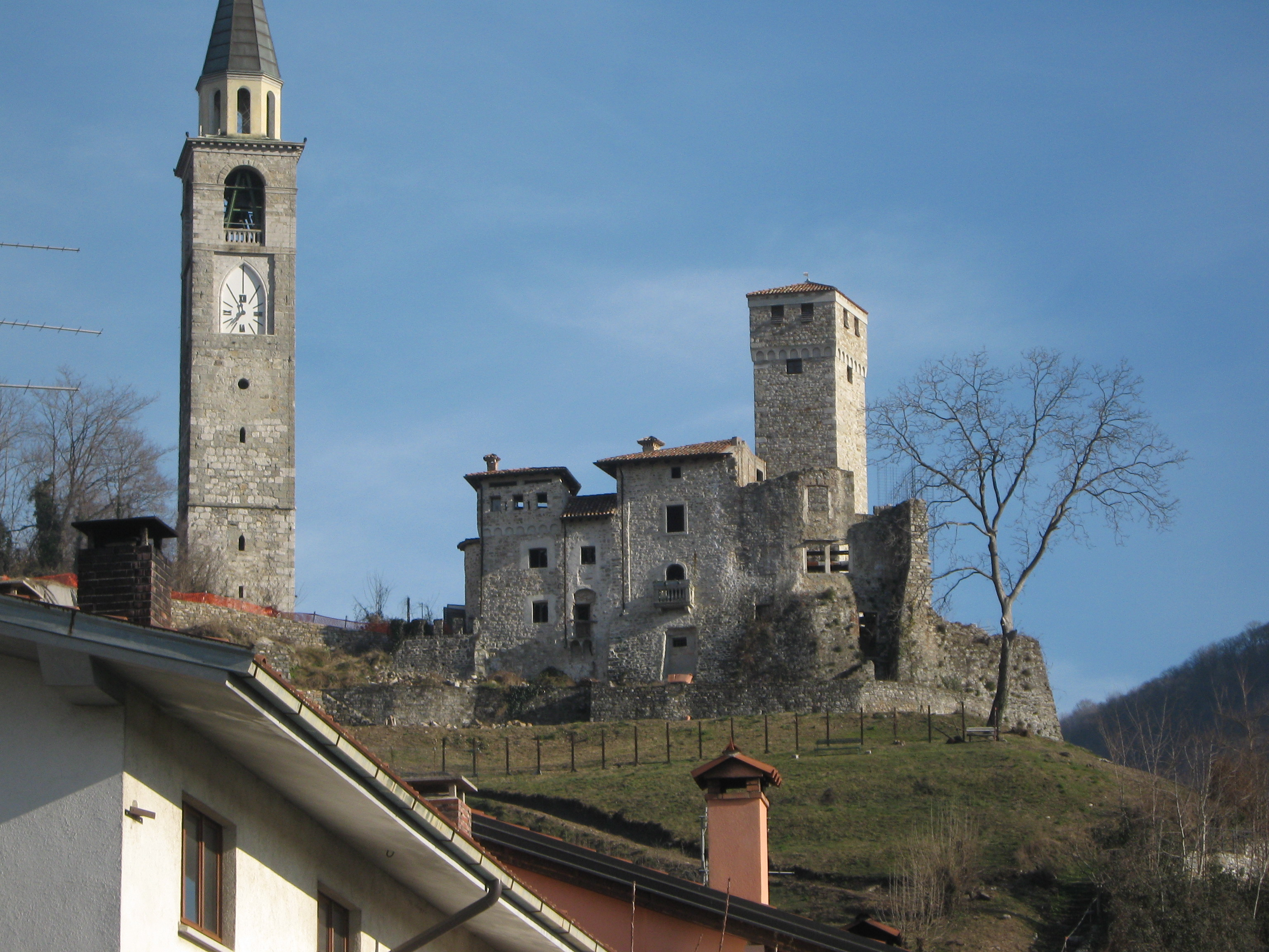 IL CASTELLO